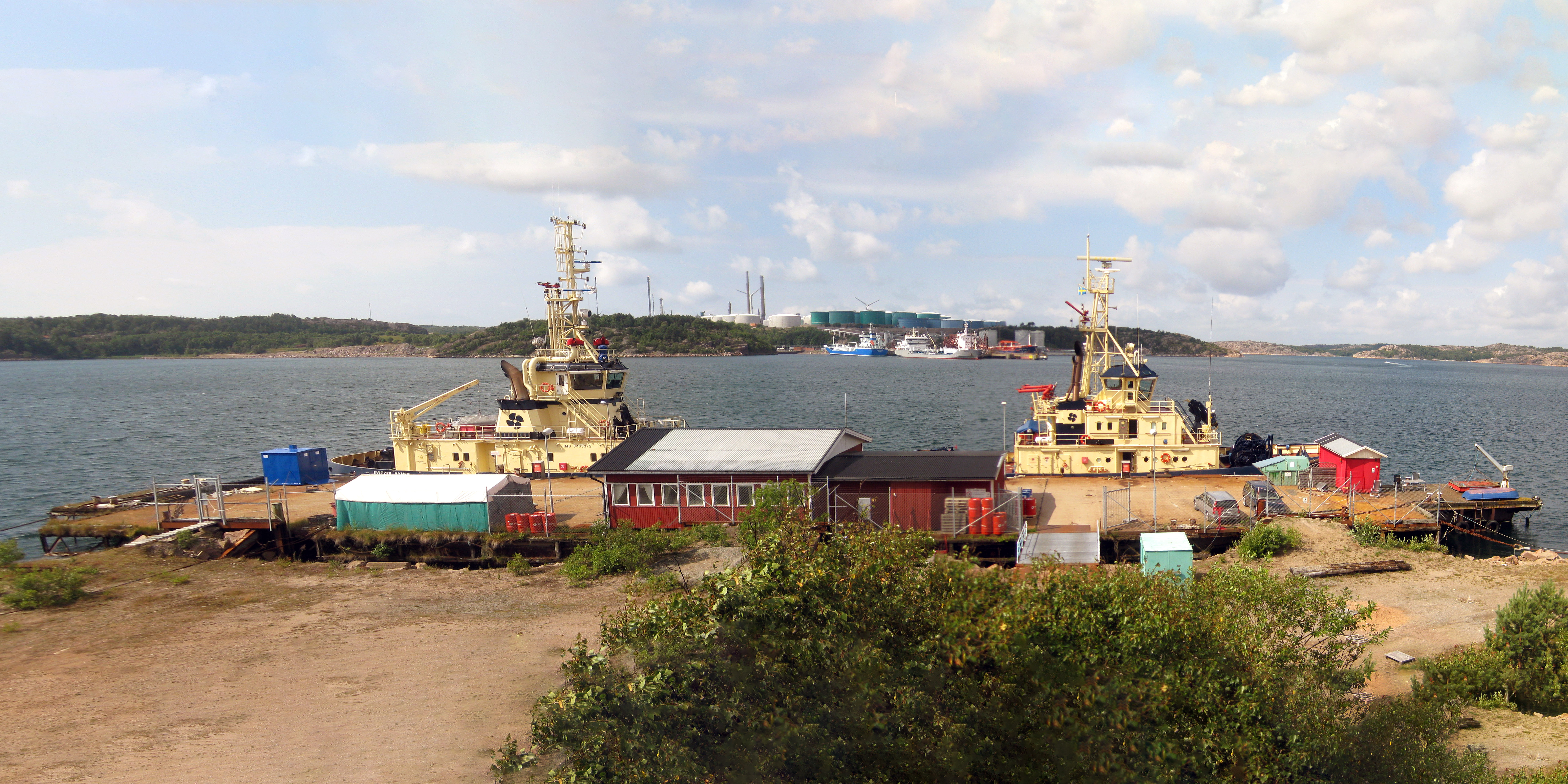 HMS Manligheten i Lahälla i Brofjorden i Bohuslän 2011. Skeppet fungerade då som pontonbrygga för bogserbåtar. I bakgrunden syns Preemraff i Brofjorden.